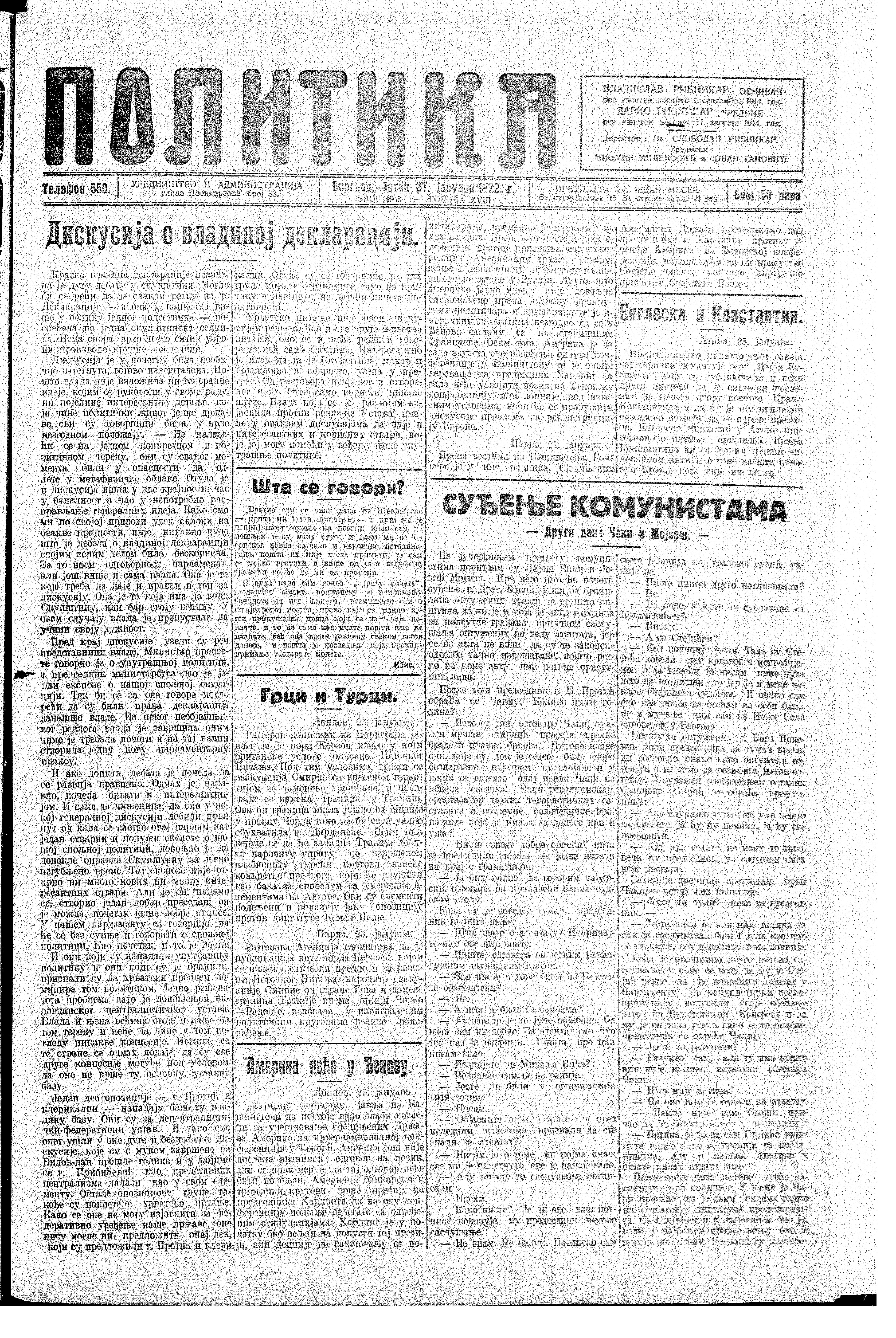 Srpskohrvatski / српскохрватски: Politika od 27. 01. 1922. sa naslovnom stranicom o suđenju komunistima nakon neuspelog atentata na regenta Aleksandra.